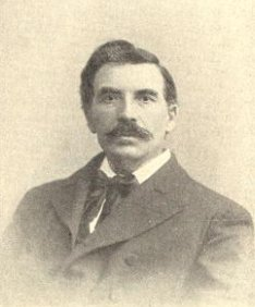 José Arechavaleta y Balpardo (1838-1912), fue un naturalista hispano-uruguayo.